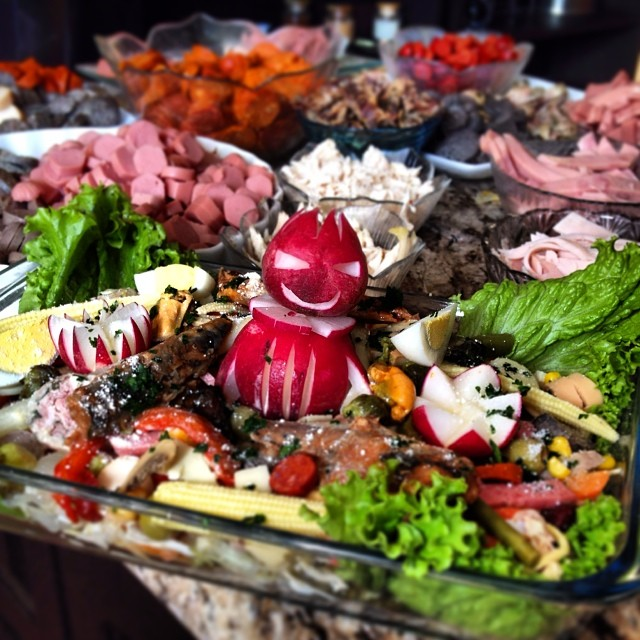 Fiambre